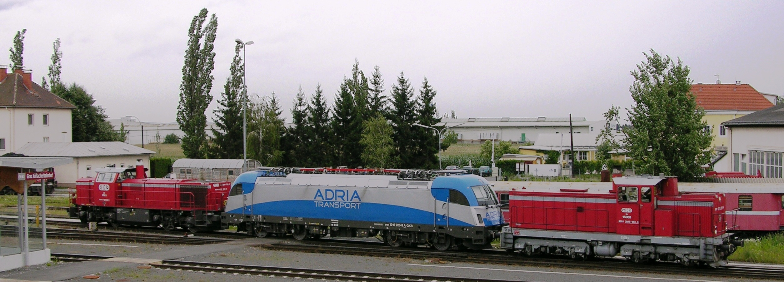 Verschub der Adria Transport Lokomotive 1216 920 am Graz Köflacherbahnhof durch GKB 1700.1 und GKB 1500.3 am 23. Juli 2008